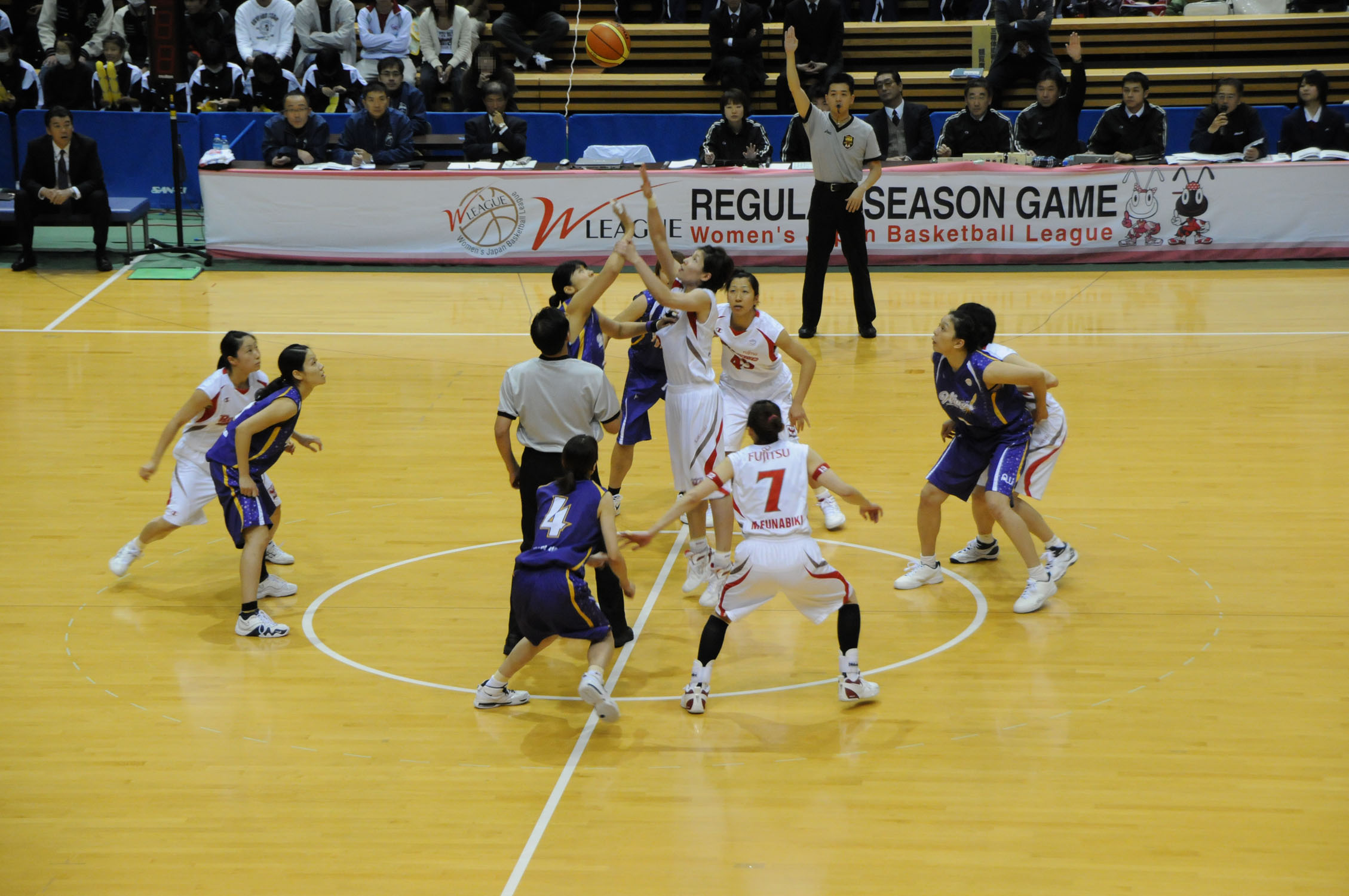 WJBL 09-10レギュラーリーグ、富士通対アイシンAW。大館樹海体育館で。